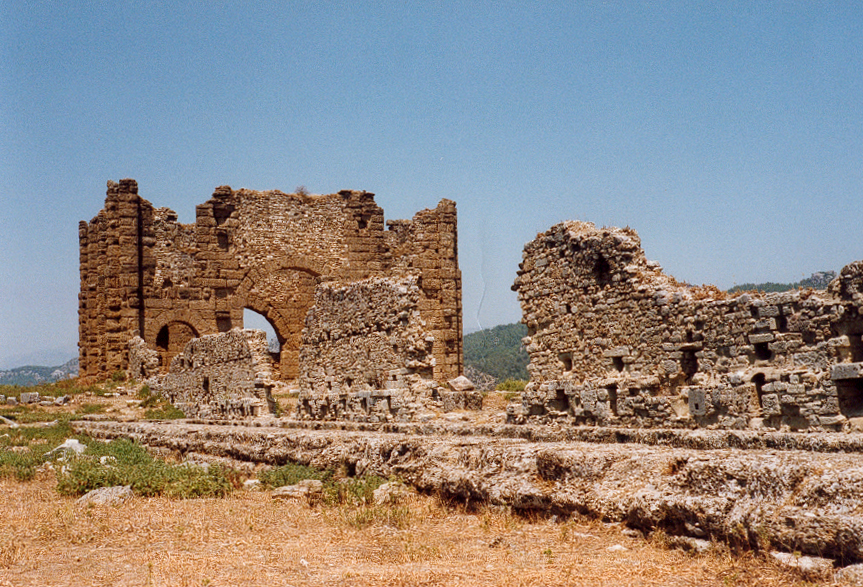 Aspendos - Basilica